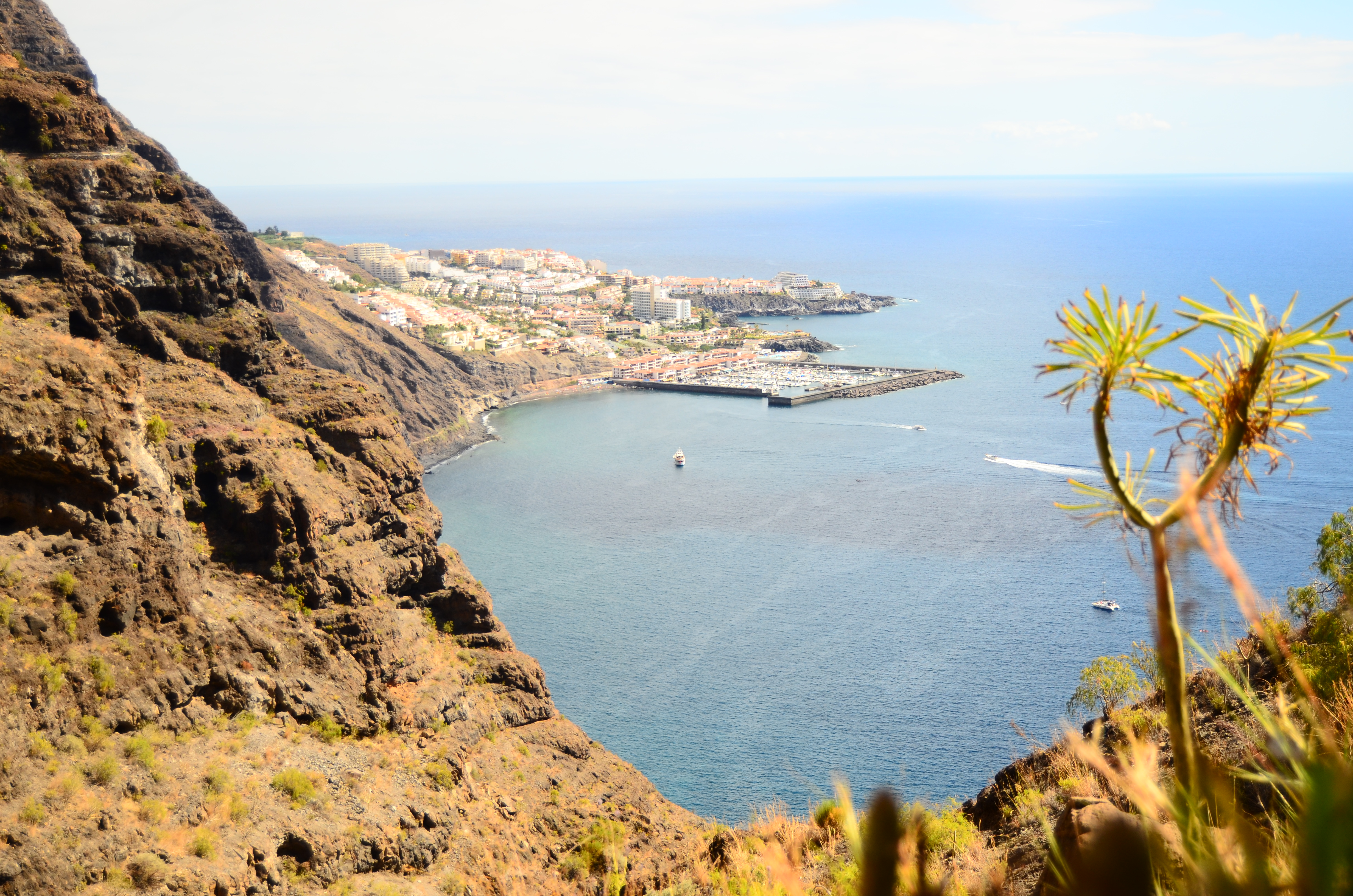 Vista de la localidad turística de Los Gigantes desde los acantilados que le dan nombre